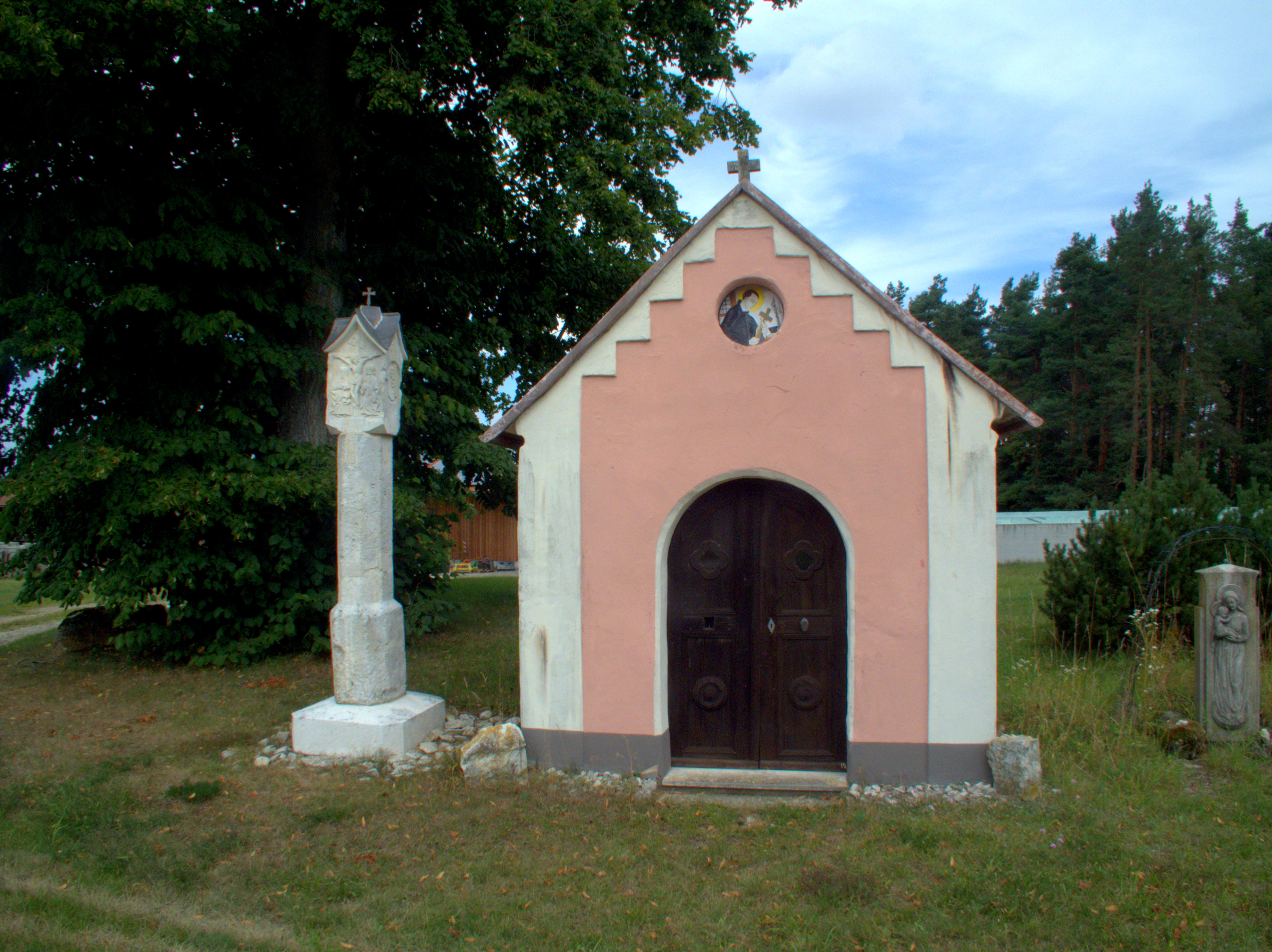 Marienkapelle Weichselstein: Außenansicht